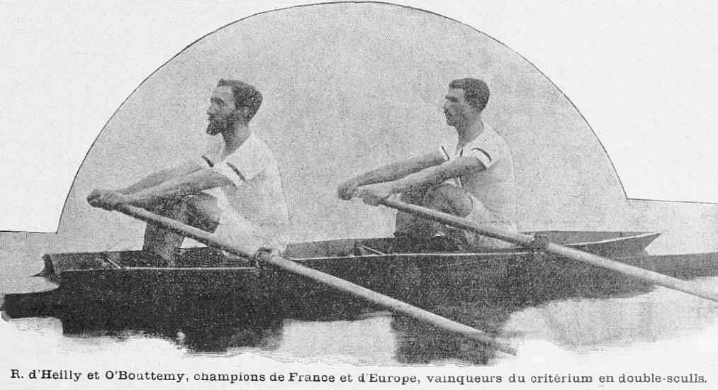 Robert D'Heilly et Octave Bouttemy, Champions de France et d'Europe en 1901 en double-sculls, et vainqueurs du Critérium du Championnat de la Seine en octobre 1901 (ci-dessus); Robert D'Heilly, de front, également Champion d'Europe en skiff en 1903 (et au championnat de la Seine en 1901).